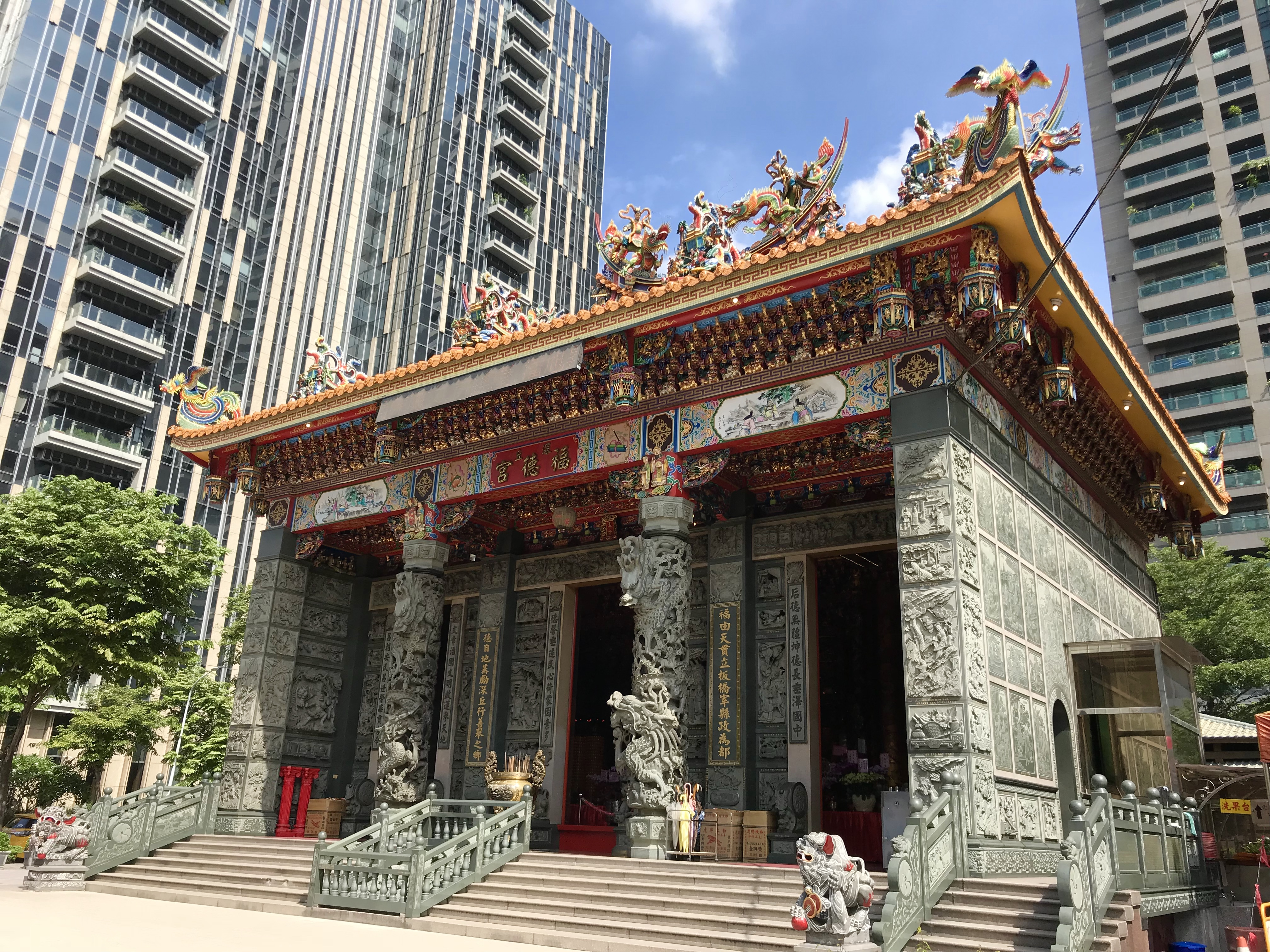 中文（台灣）: 深丘福德宮斜照